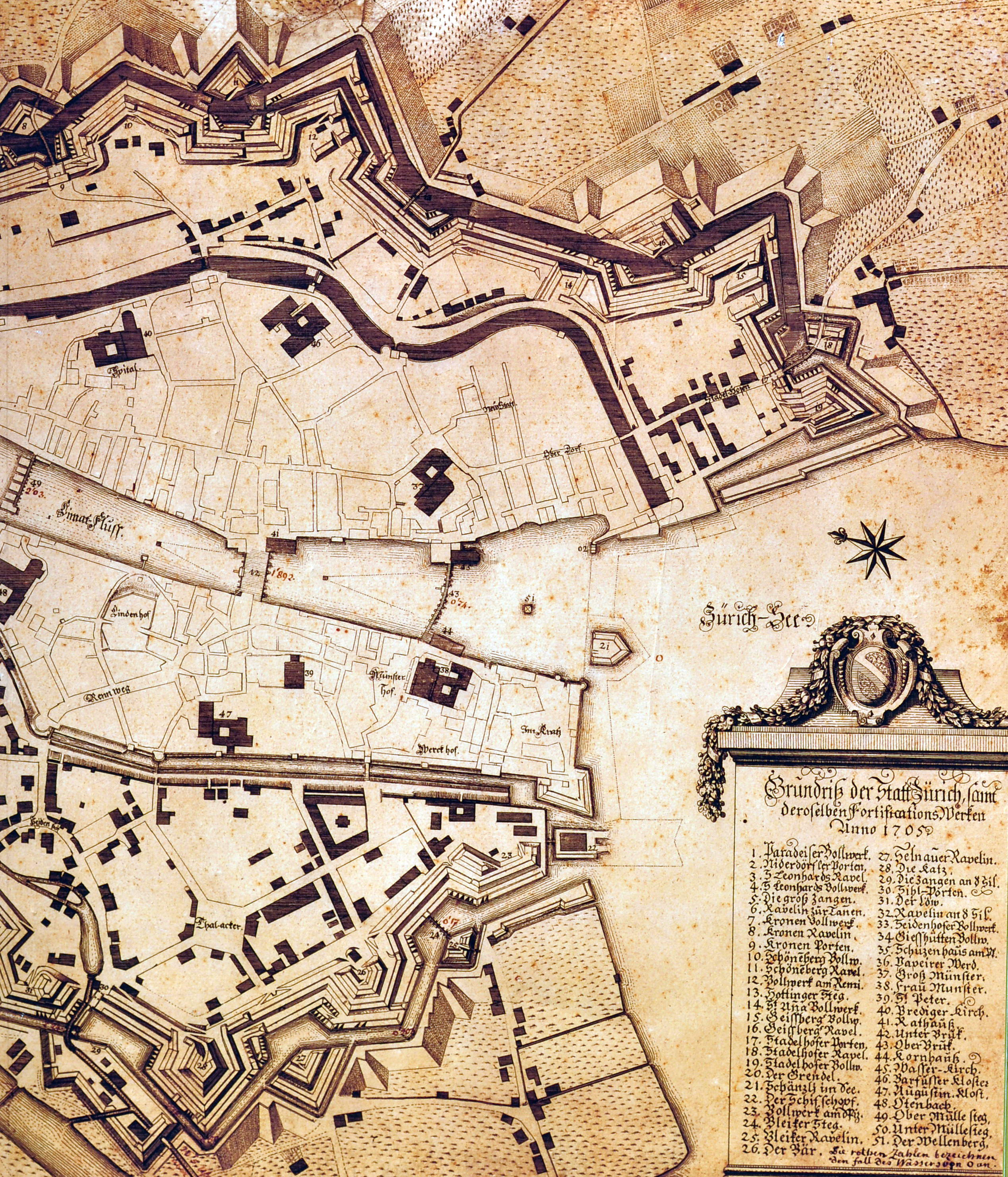 Stadtplan von Zürich mit den «Fortifications Werken» auf einem Kupferstich von Johann Heinrich Vogel aus dem Jahr 1705. Die Überreste der sogenannten Stadelhoferbastion und des Stadelhoferdamms (rechts oben) im heutigen Seefeld wurden durch die Grabung Parkhaus Opéra erfasst.Fotografiert von den Schautafeln der Archäologischen Grabung Parkhaus Opéra in Zürich (Schweiz); die Beschreibungen sind den entsprechenden Abbildungen im Wortsinn entnommen.